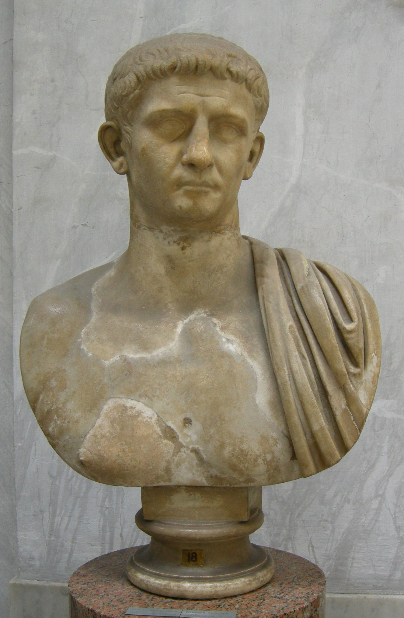 Busto di Claudio, da Priverno. Musei Vaticani, Museo Chiaramonti - Braccio Nuovo; inv. 2287.